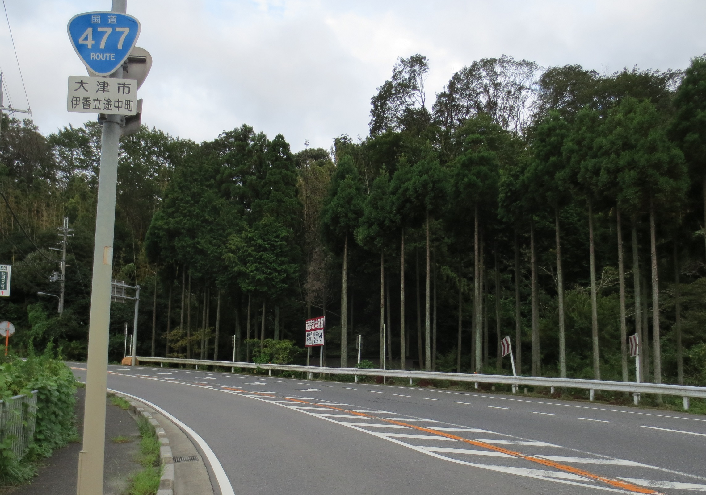 大津市伊香立途中町付近の国道477号。